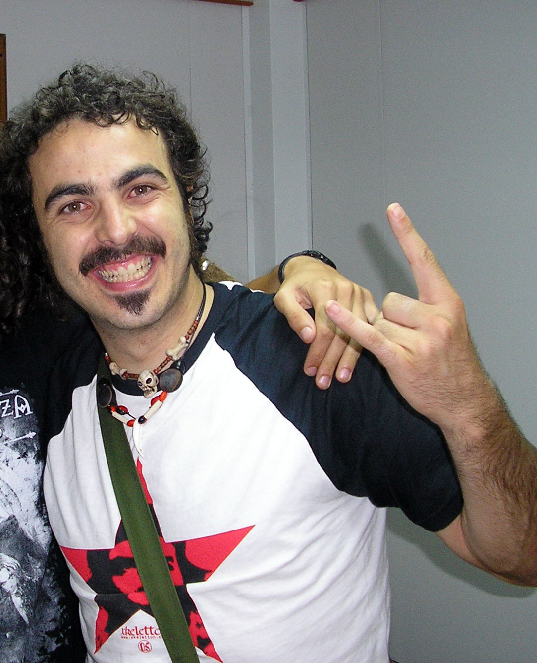 Huecco, cantante español. Anteriormente conocido como Ivanh, durante su etapa como vocalista de Sugarless. La foto corresponde a uno de los últimos momentos con esa banda, en la etapa de Sugarless Planet, en un concierto en Alcorcón.